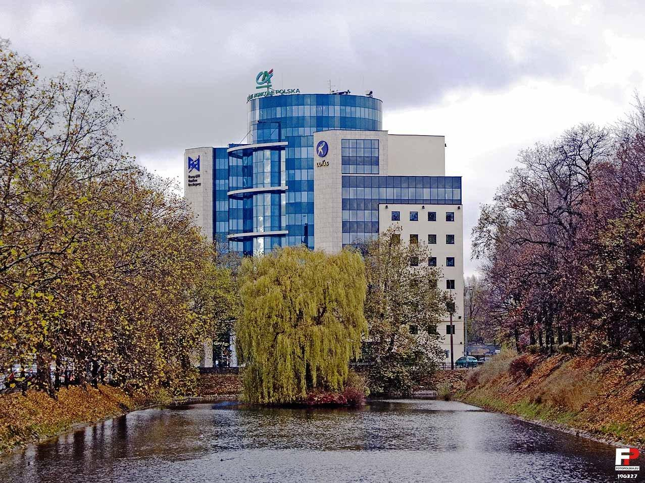 Dzienny widok Centrum od strony Krupniczej.